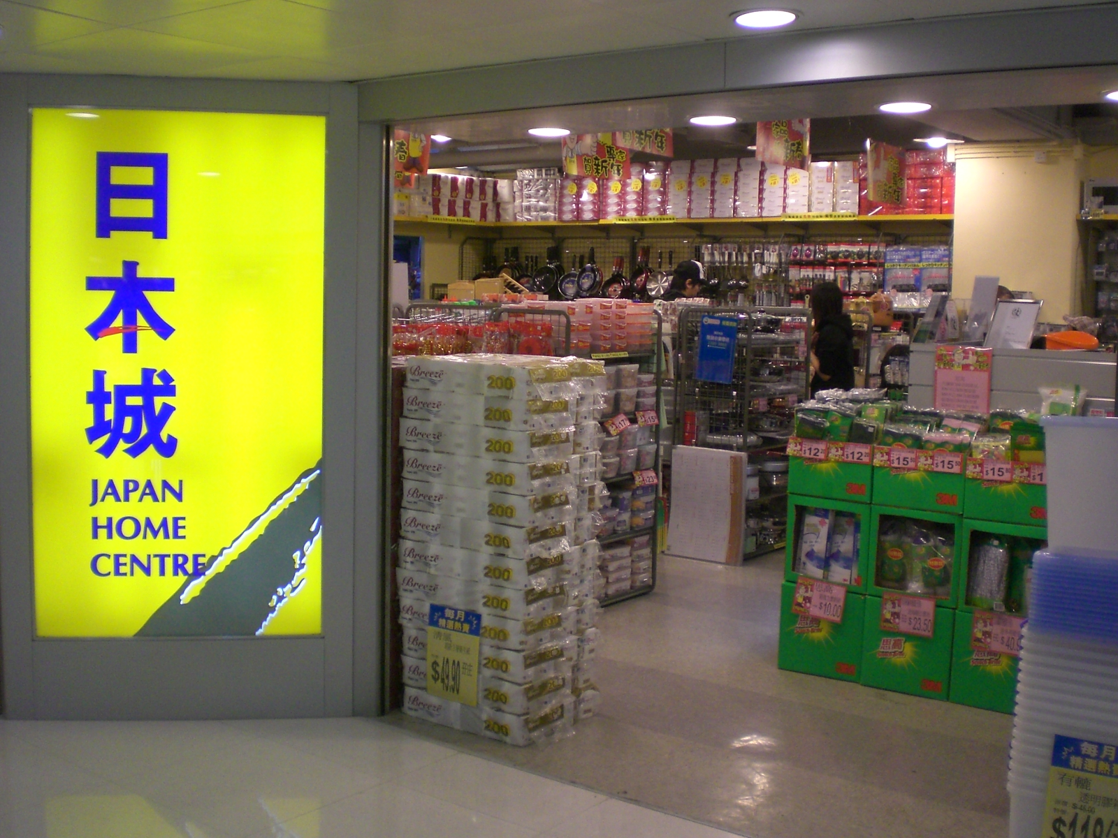 元朗區元朗新市鎮青山公路元朗段 元朗廣場 日本城